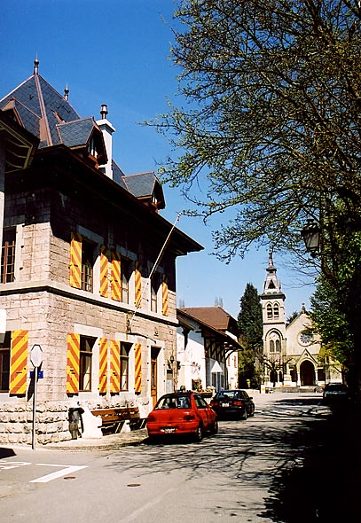 Gemeindehaus (mairie) und prot. Kirche (temple) von Genthod, April 2001